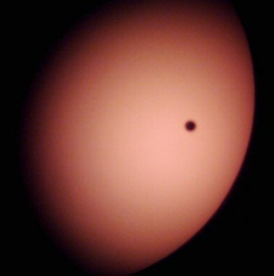 Der Venustranist im Jahr 2004 kurz vor dem 3. Kontakt Beobachtungsinstrument: Solaroskop Nachbearbeitungen: Leichter Rotton hinzugefügt